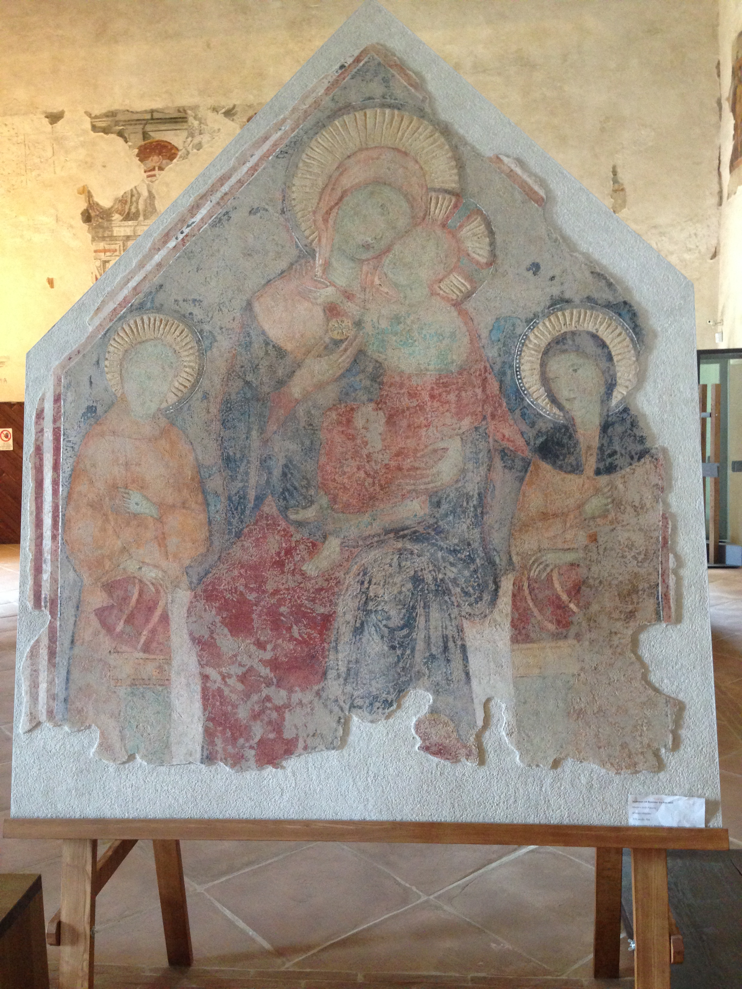 Maestro delle Palazze. Madonna col bambino e i SS. Francesco e Chiara. Spoleto